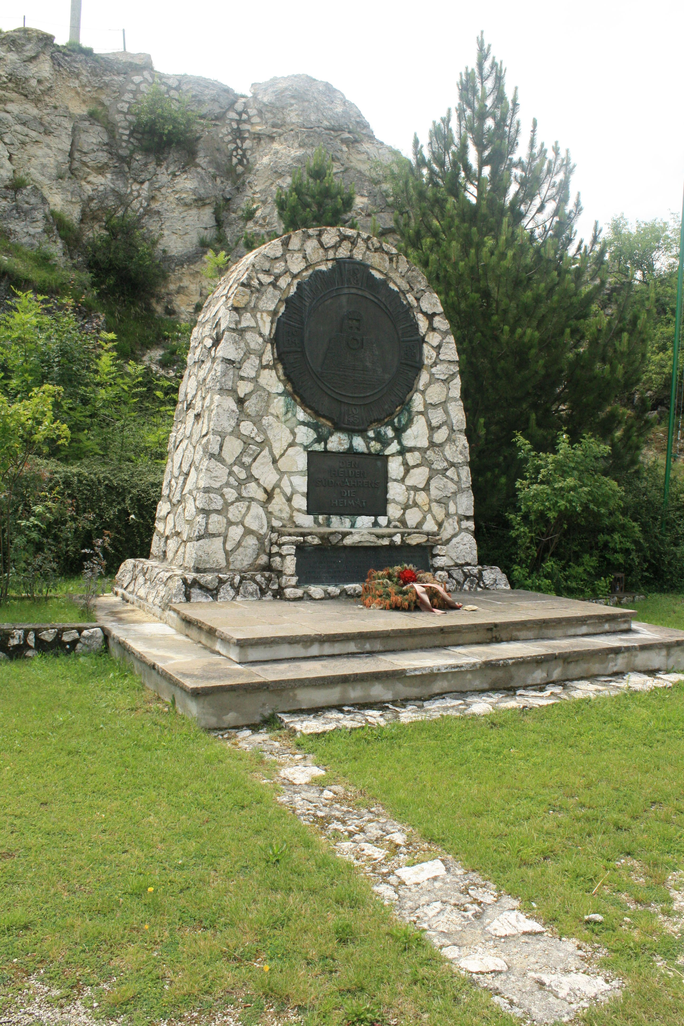 Südmährenkreuz im niederösterreichischen Weinviertel